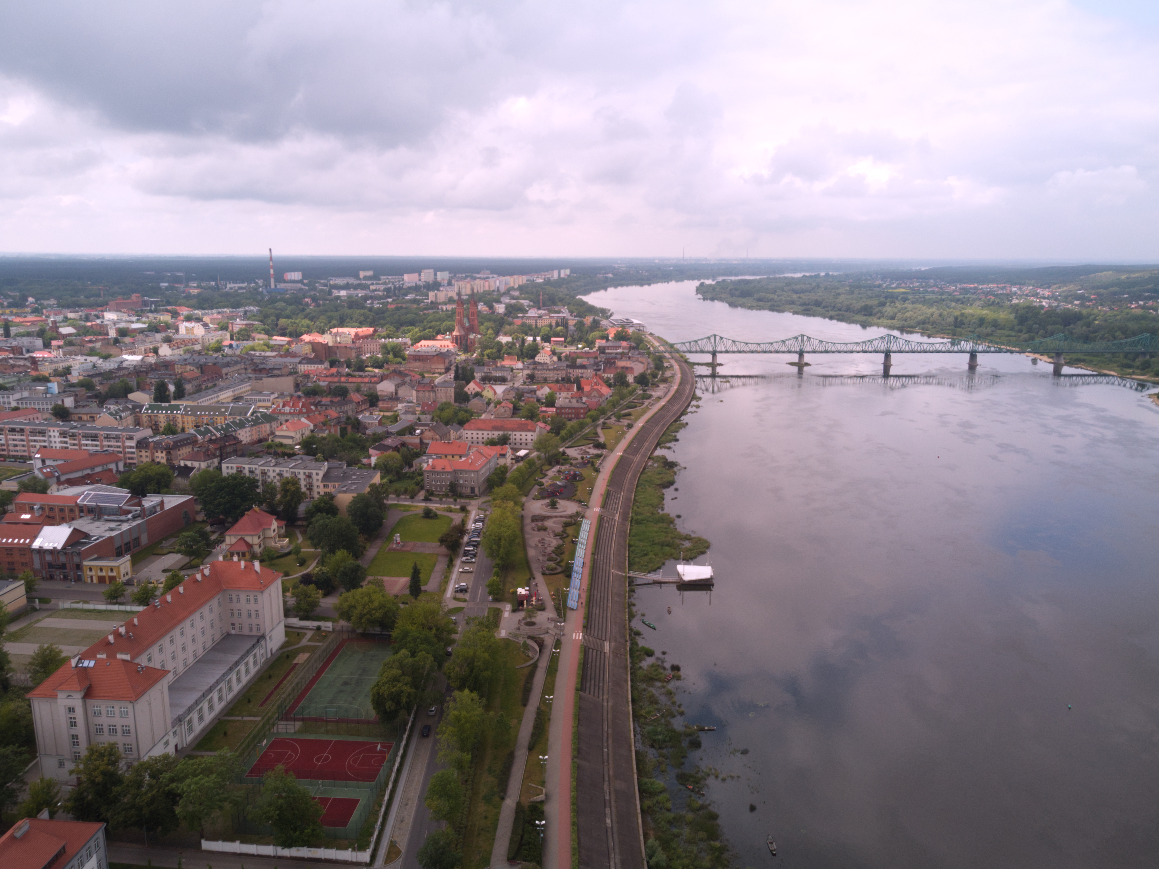 Bulwary (2020 r.)